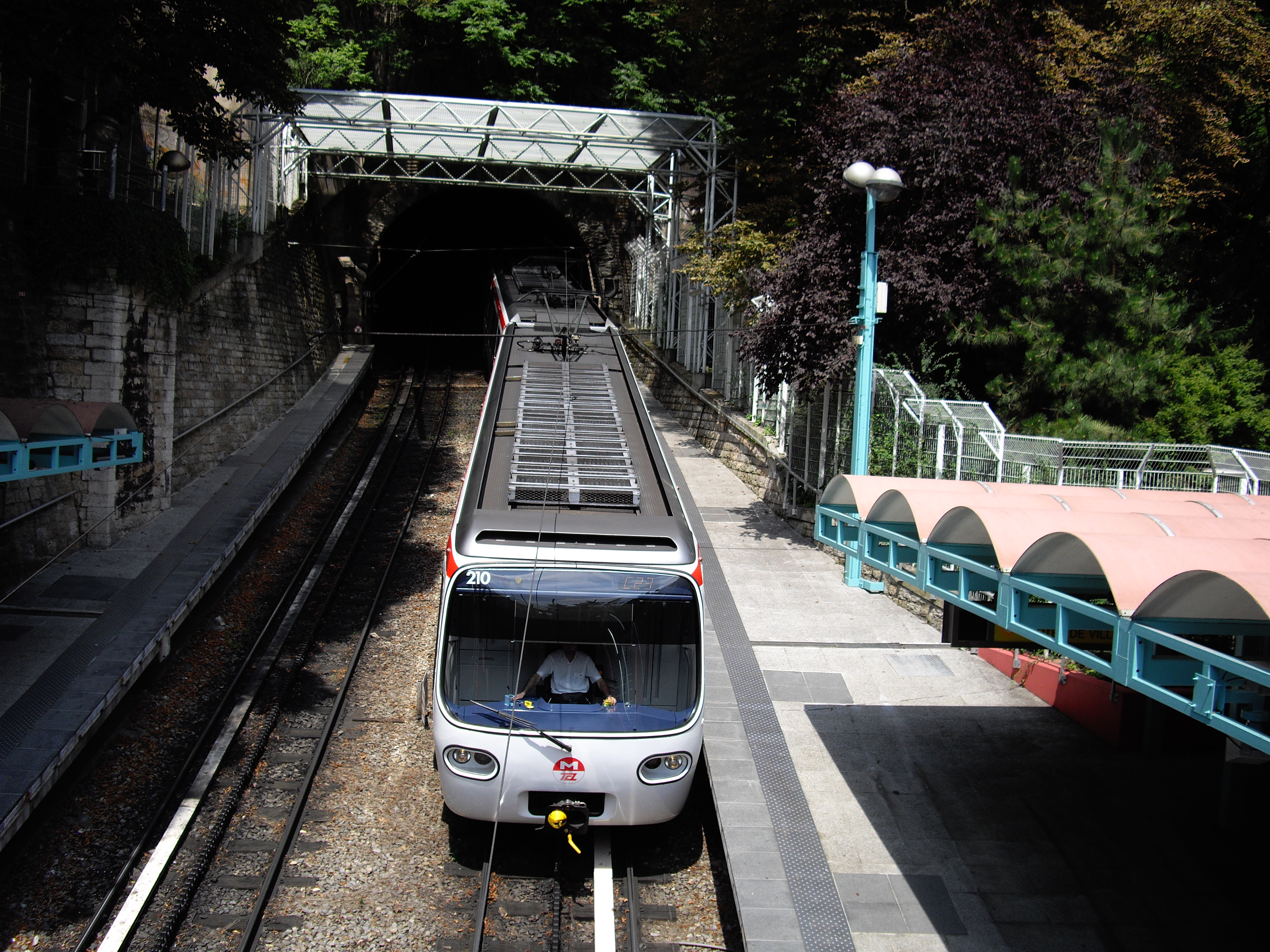 MCL80 du métro lyonnais, à Croix-Paquet